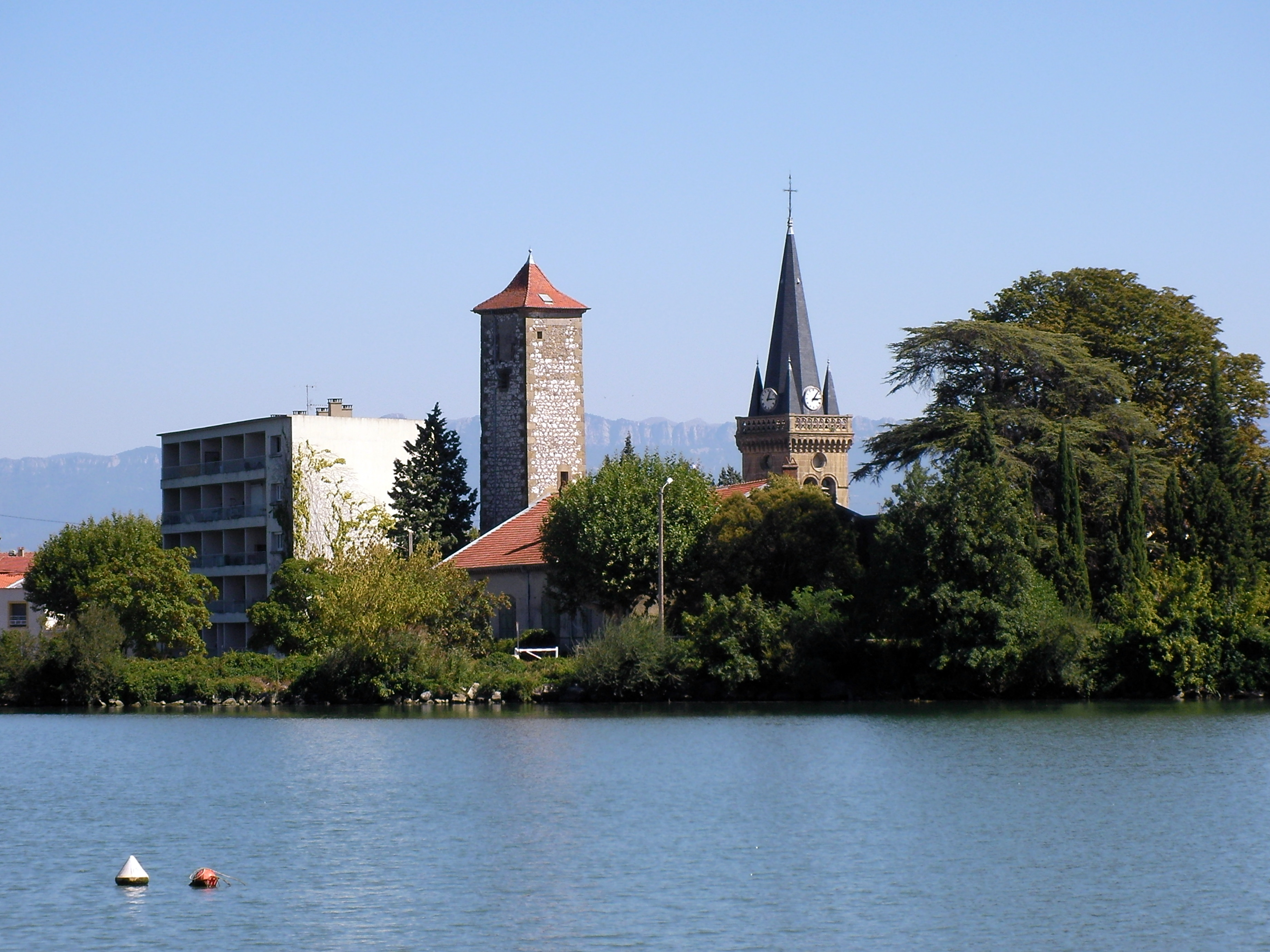 La Roche de Glun (Drôme / France) vue depuis Glun (Ardèche / France)